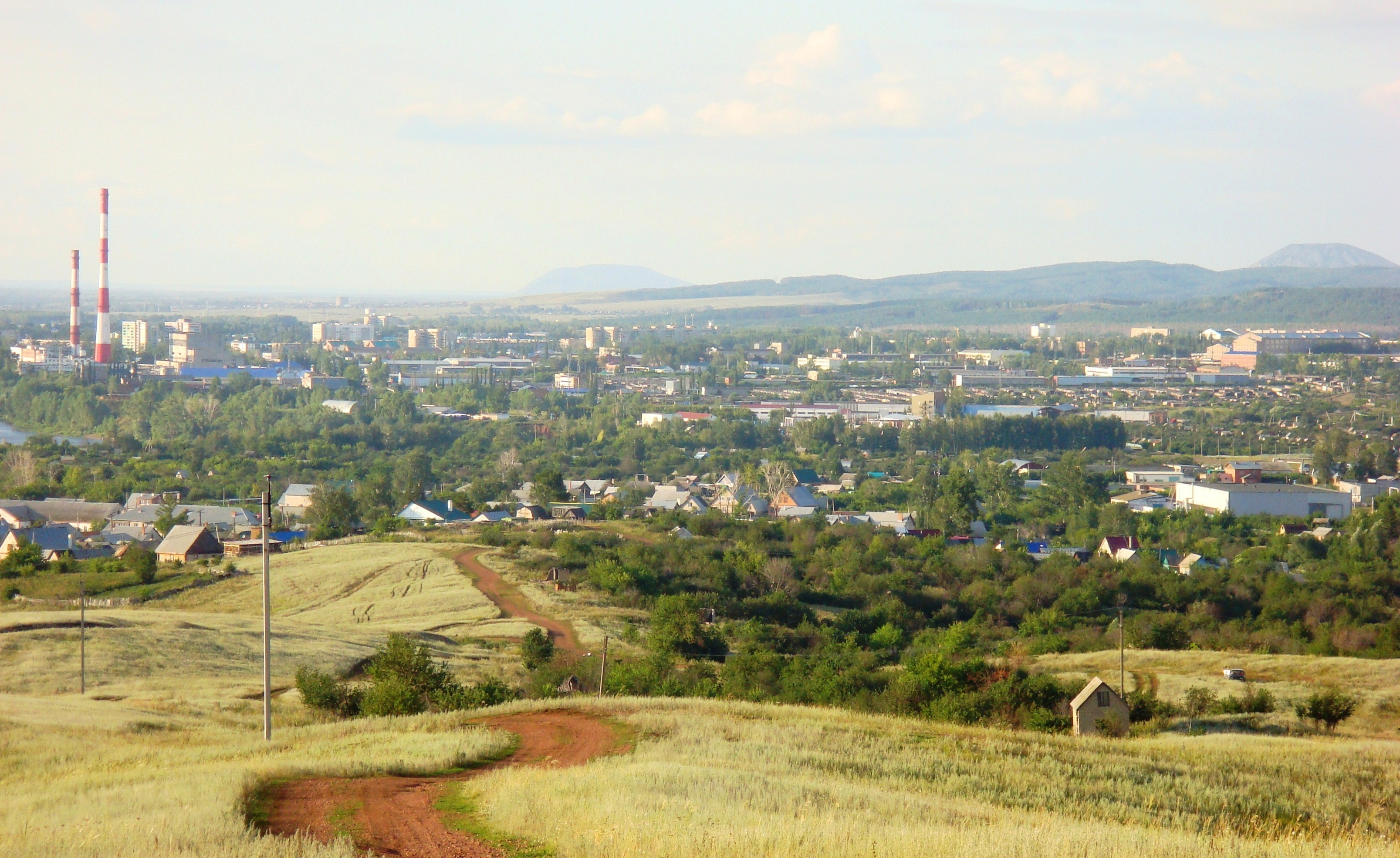 Панорама города Ишимбая